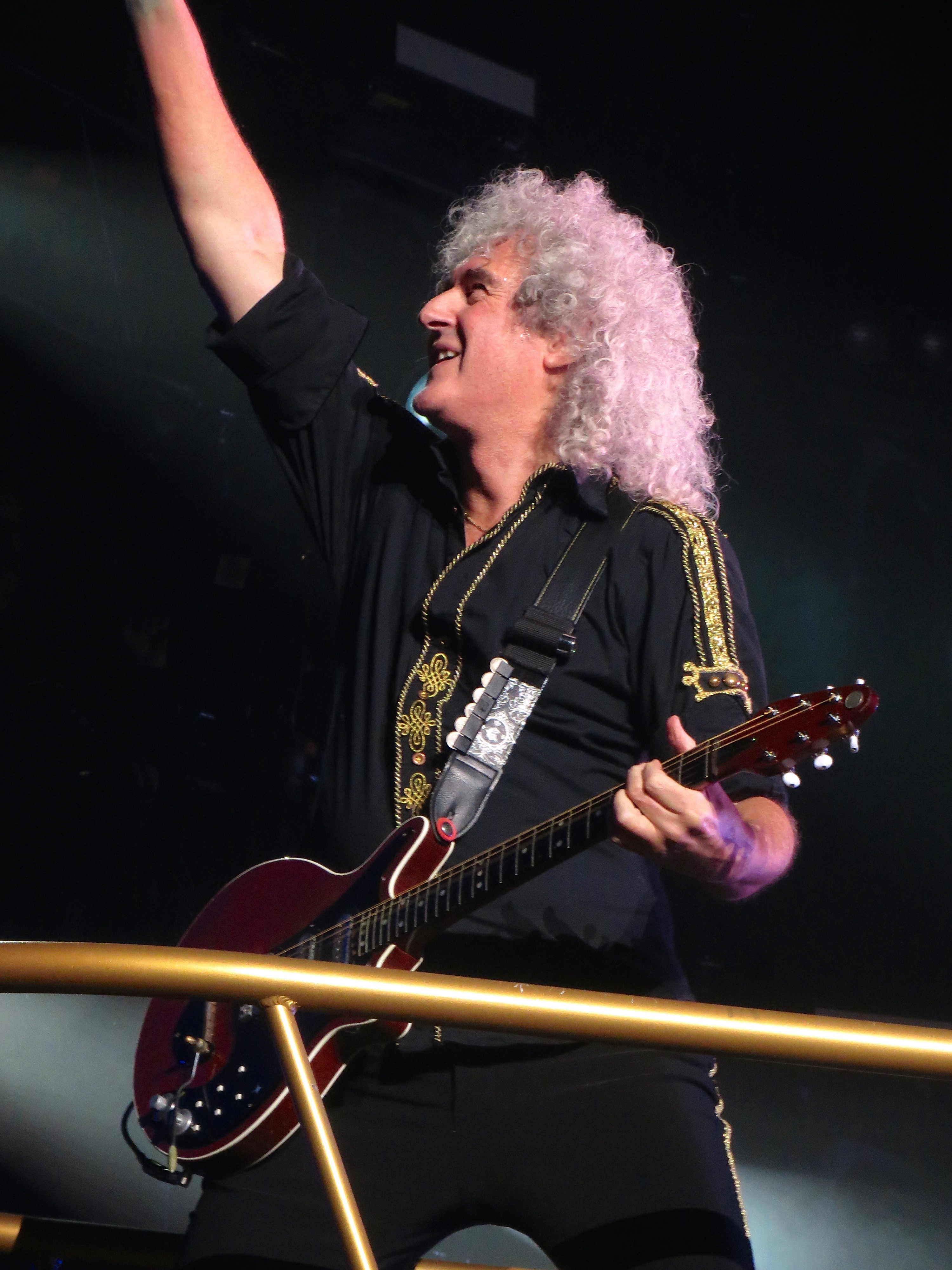 Queen + Adam Lambert 5